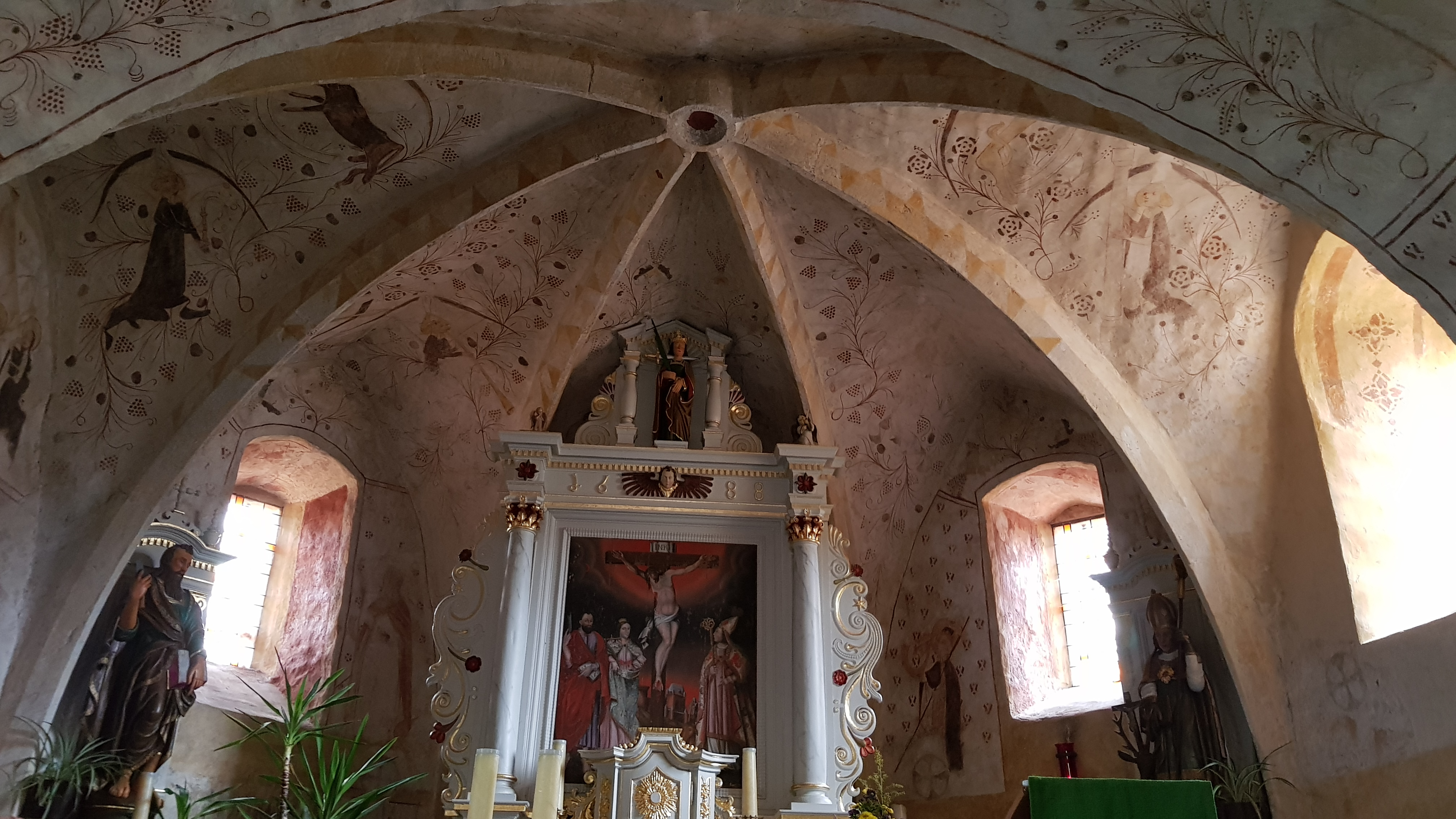 Kapelle St. Bartholomäus, Wiesenbach, Sankt Vith, Belgien This photo of immovable heritage has been taken in the Walloon Region